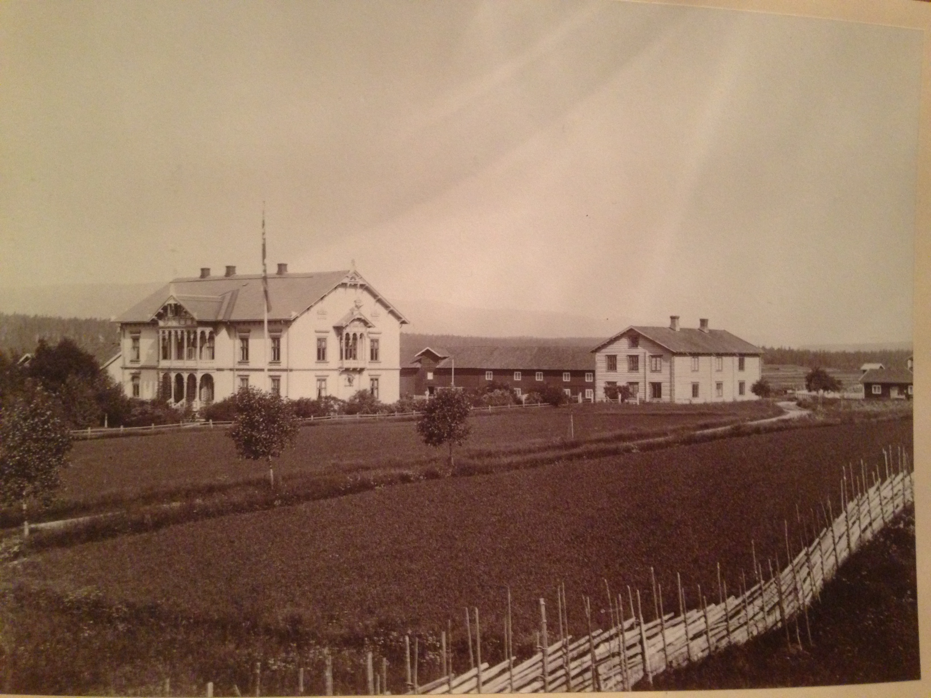 Bildet viser Melgården på Deset i Åmot kommune omkring 1878. Fotograf er